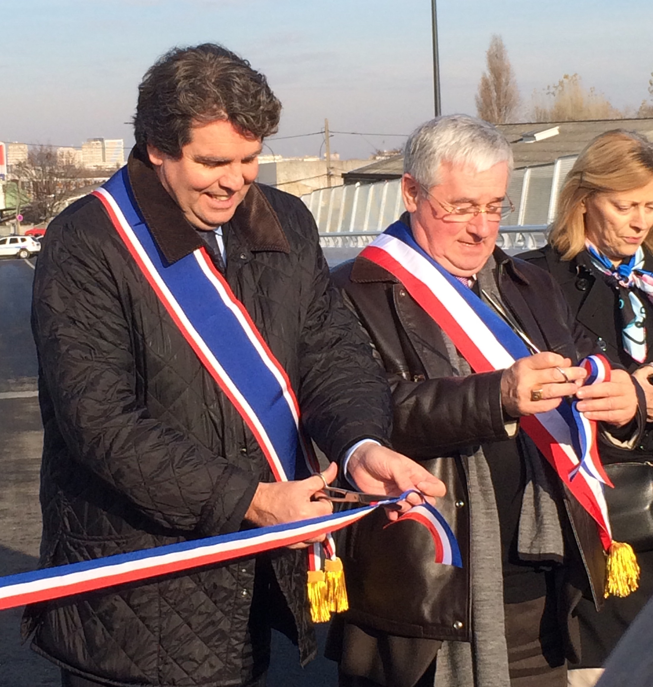 Le maire du Blanc-Mesnil et conseiller régional Thierry Meignen, le maire de Pierrefitte Michel Fourcade et la sous-préfète de Saint-Denis Nicole Isnard lors de l'inauguration du pont Frida Kahlo